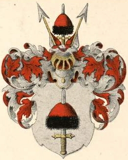 Wartmanni suguvõsa aadlivapp